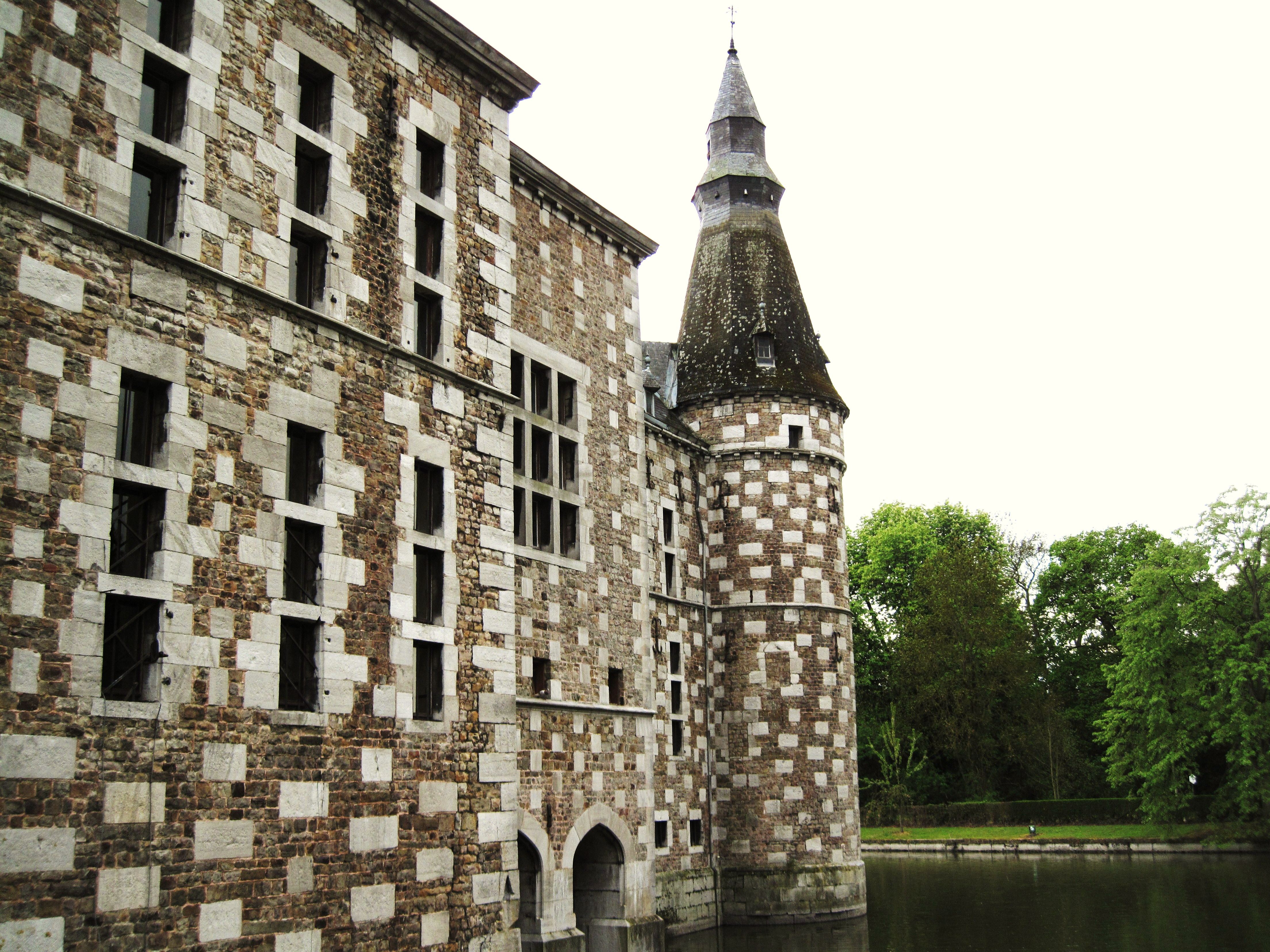 Château de plaine "Renaissance XVIIe siècle" à Amay (province de Liège).Patrimoine exceptionnel de Wallonie.